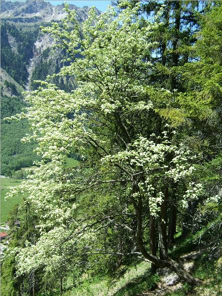 Blühende Mehlbeere (Sorbus aria) bei Hinterstein im Allgäu